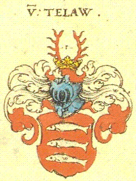 Familienwappen des meißnischen Geschlechtes von Döhlau, Dölau, Telaw...